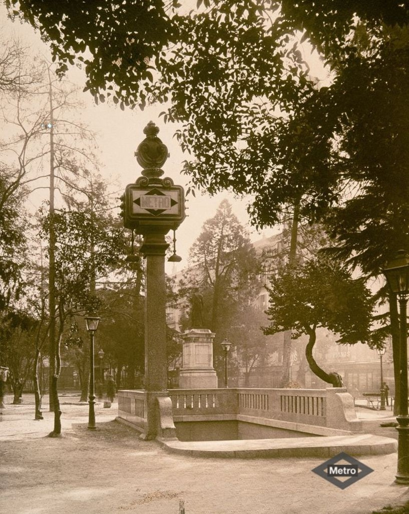 Vista de la estación de Metro de Progreso (actual Tirso de Molina), en Madrid (España) en los años 1920. Puede verse el desaparecido poste-farola con el que se identificaba la boca de metro, diseño del arquitecto Antonio Palacios. La imagen procede del Archivo fotográfico de Metro de Madrid.